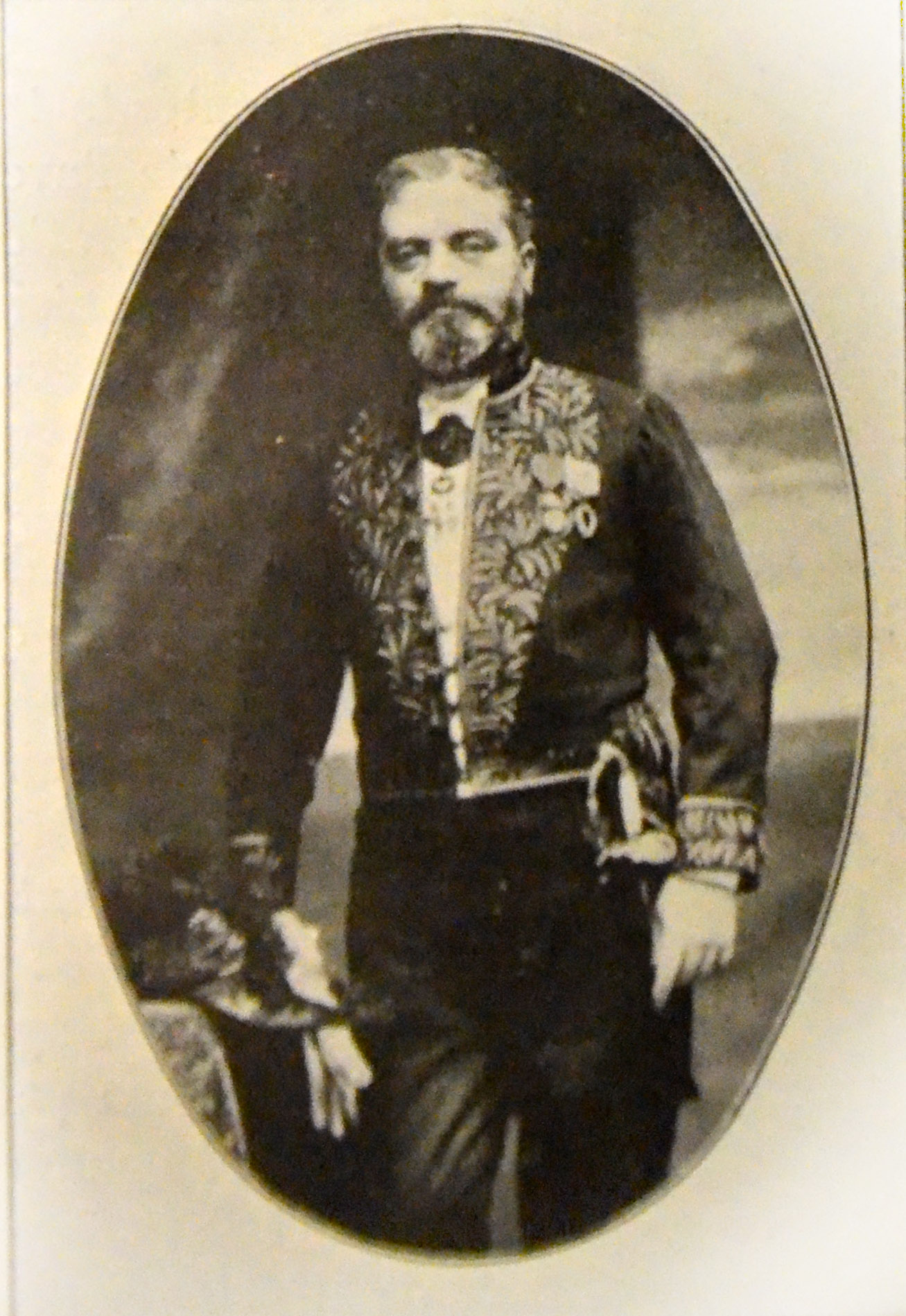 Photo légendée "HP Nénot" pour Henri-Paul Nénot), membre de l'Institut", dans un article de la "Revue illustrée" (Tome relié 1902)